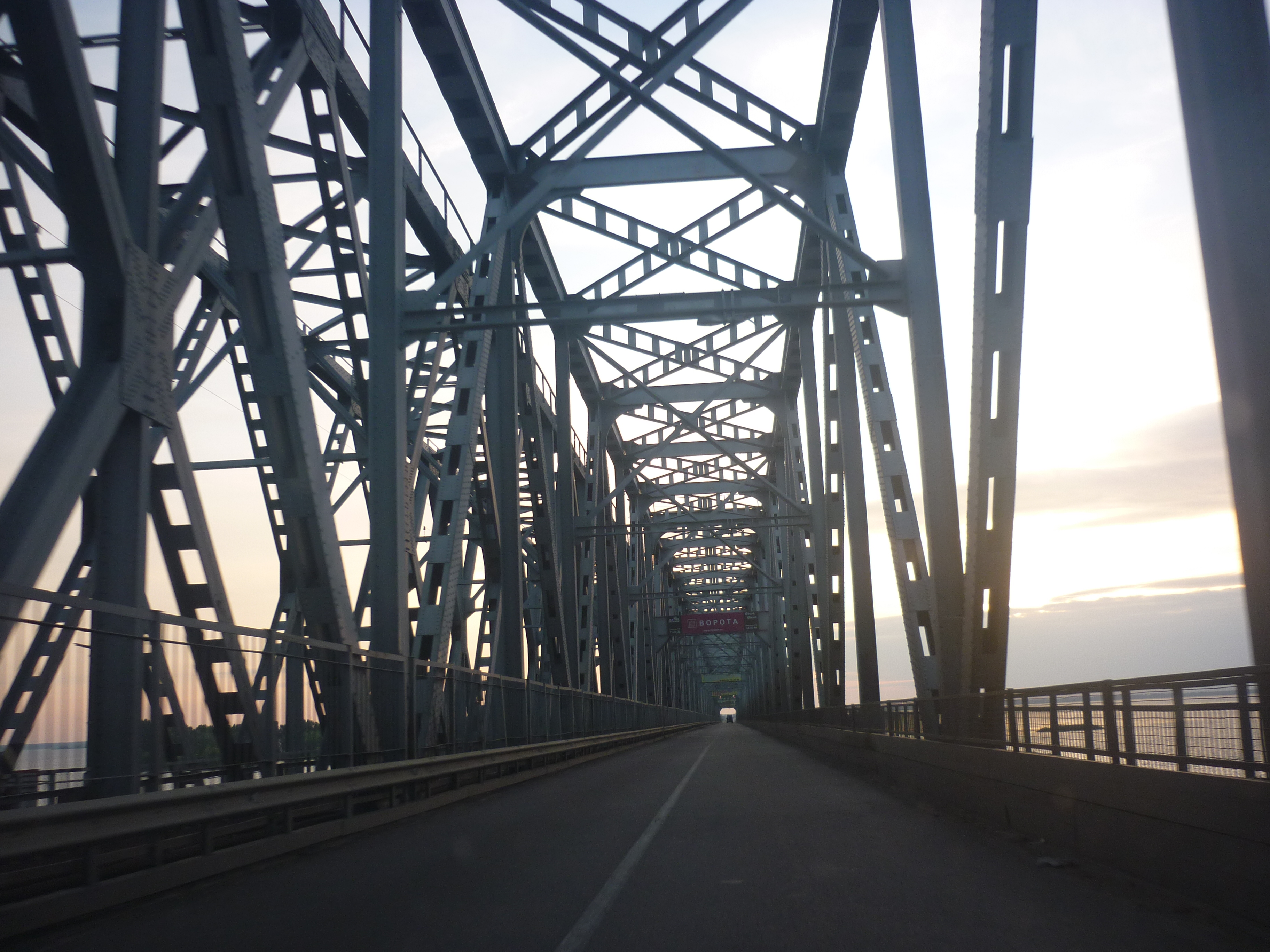 Черкаський міст через Дніпро